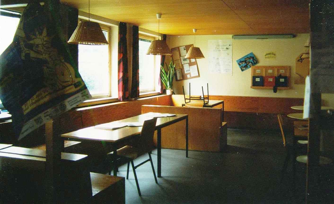 Aufenthaltsbereich "Café Fäustle" der EFHS Reutlingen